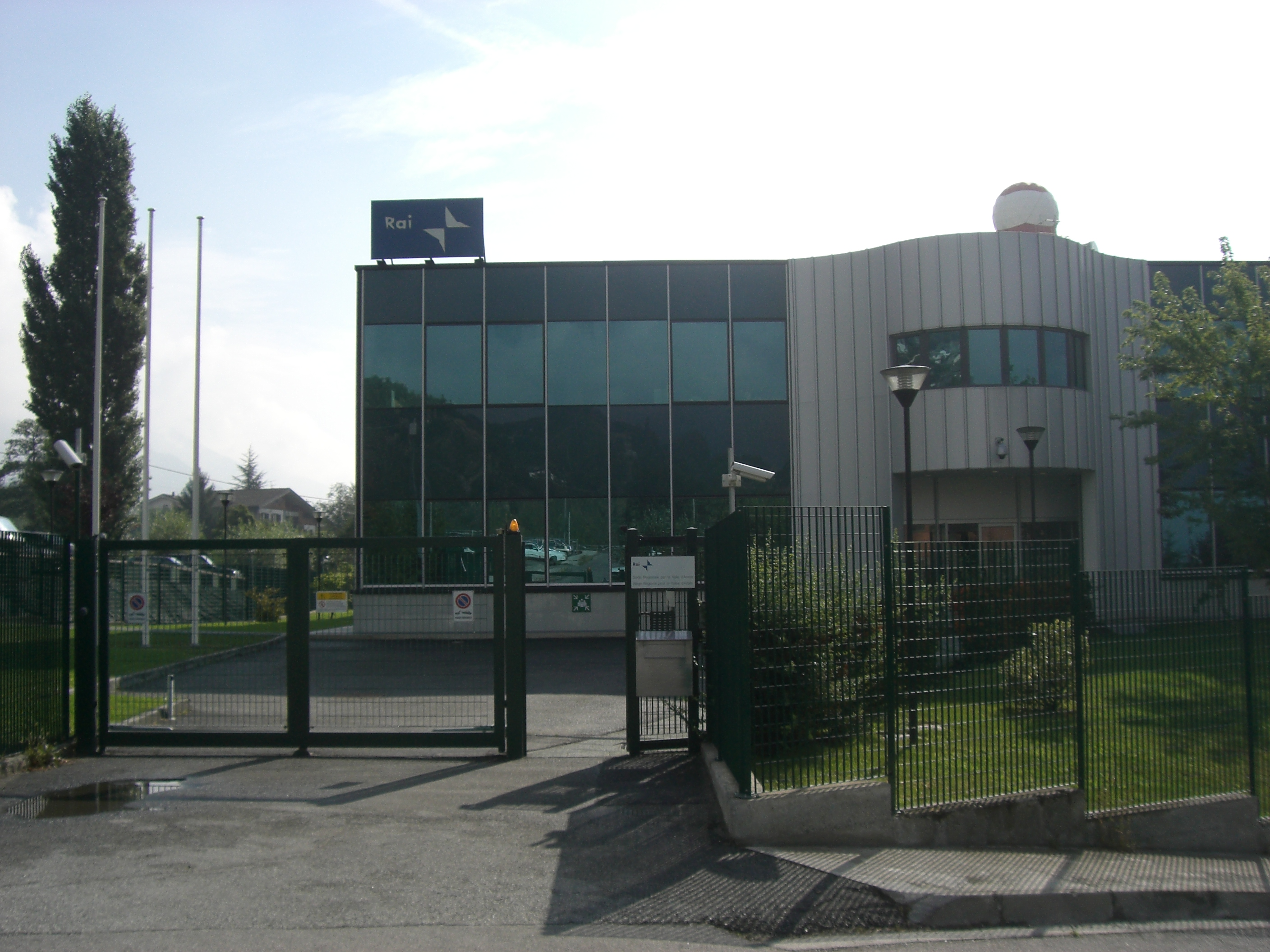 Photo su siège RAI Vd'A à la Grande-Charrière (St-Christophe - AO)